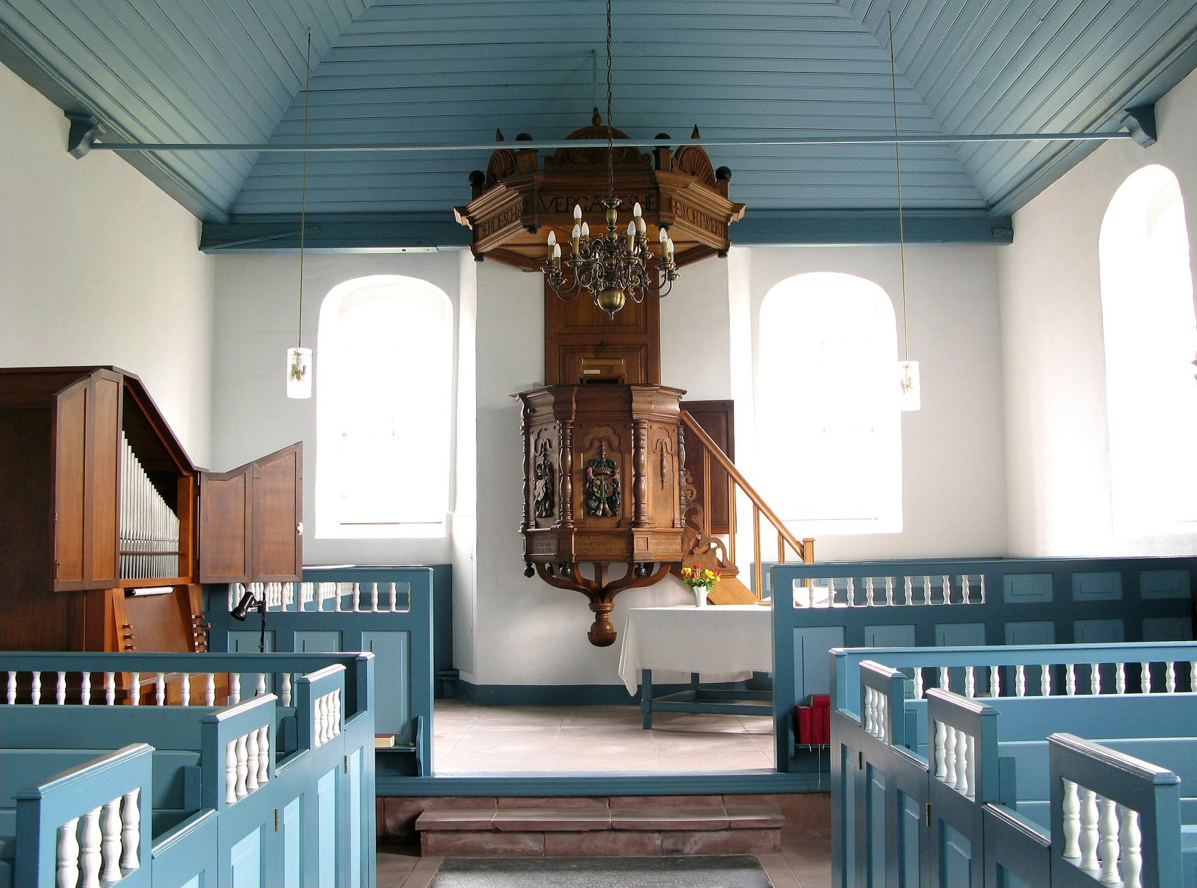 Inneneinrichtung der Kirche in Canhusen